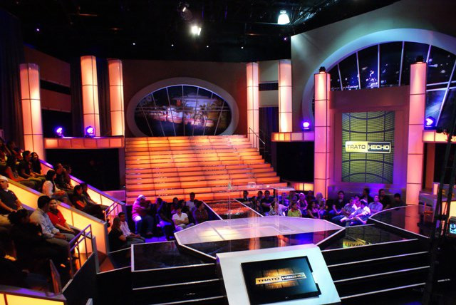 Estudio de TV de Trato Hecho en, Telecorporación Salvadoreña de El Salvador